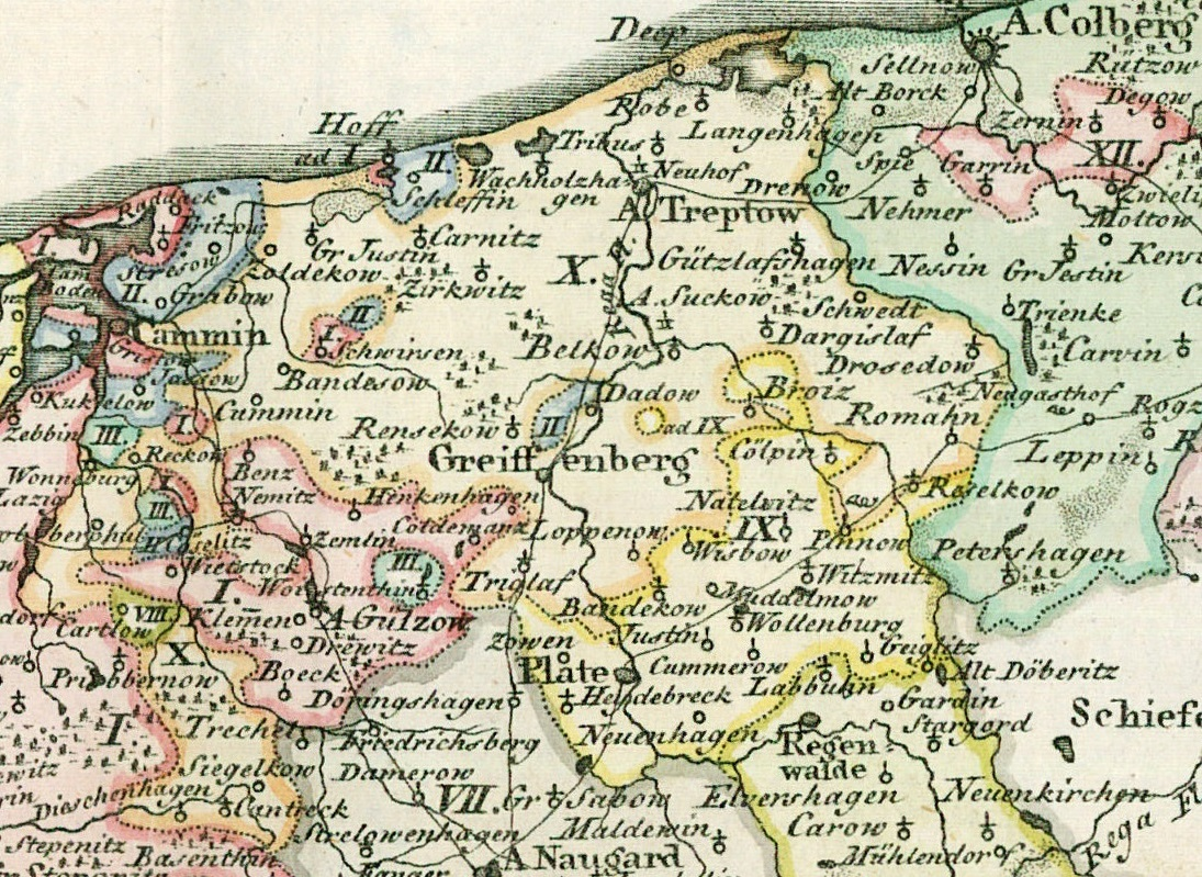 Ausschnitt aus "Landkarte des Herzogtums Vor- und Hinterpommern aus dem Jahr 1794